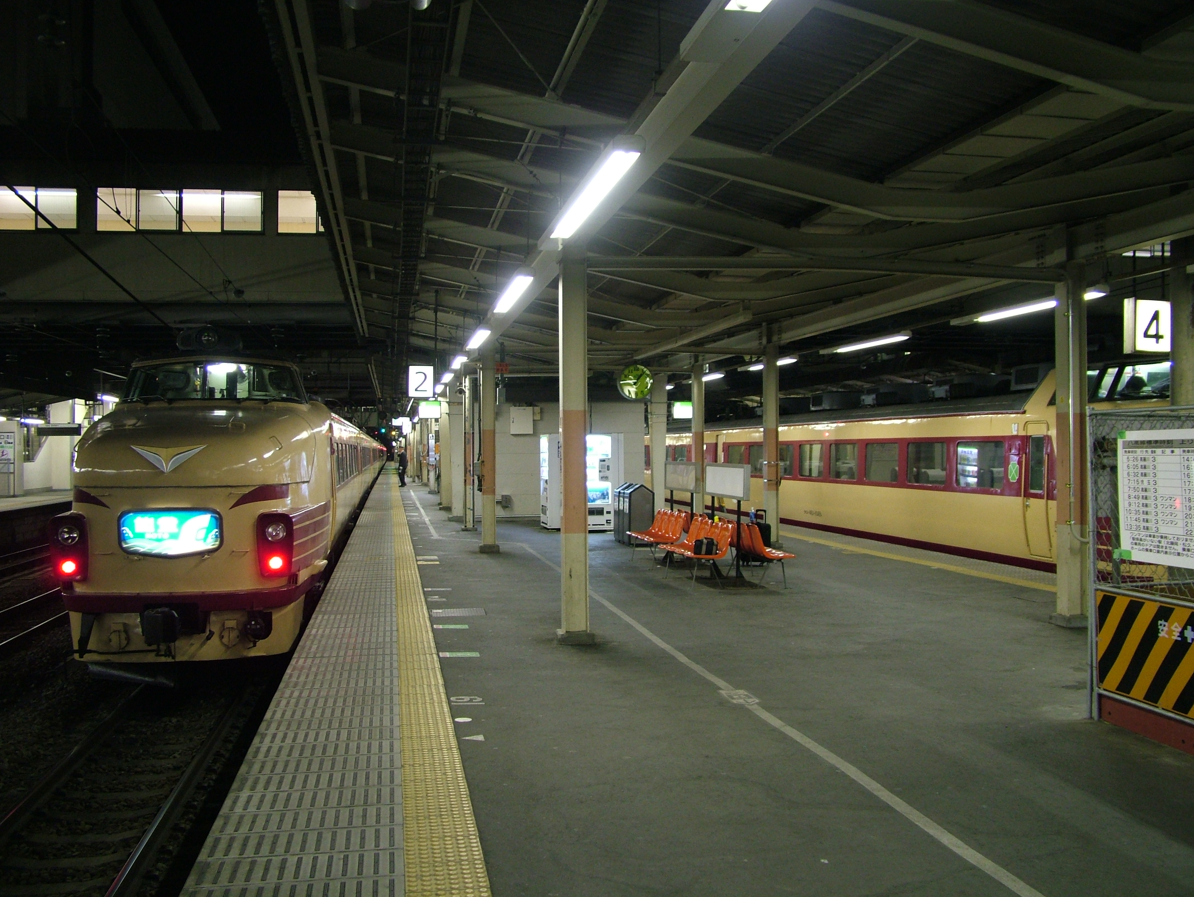 能登 489系時代 高崎駅にてムーンライトえちごと並んだところ